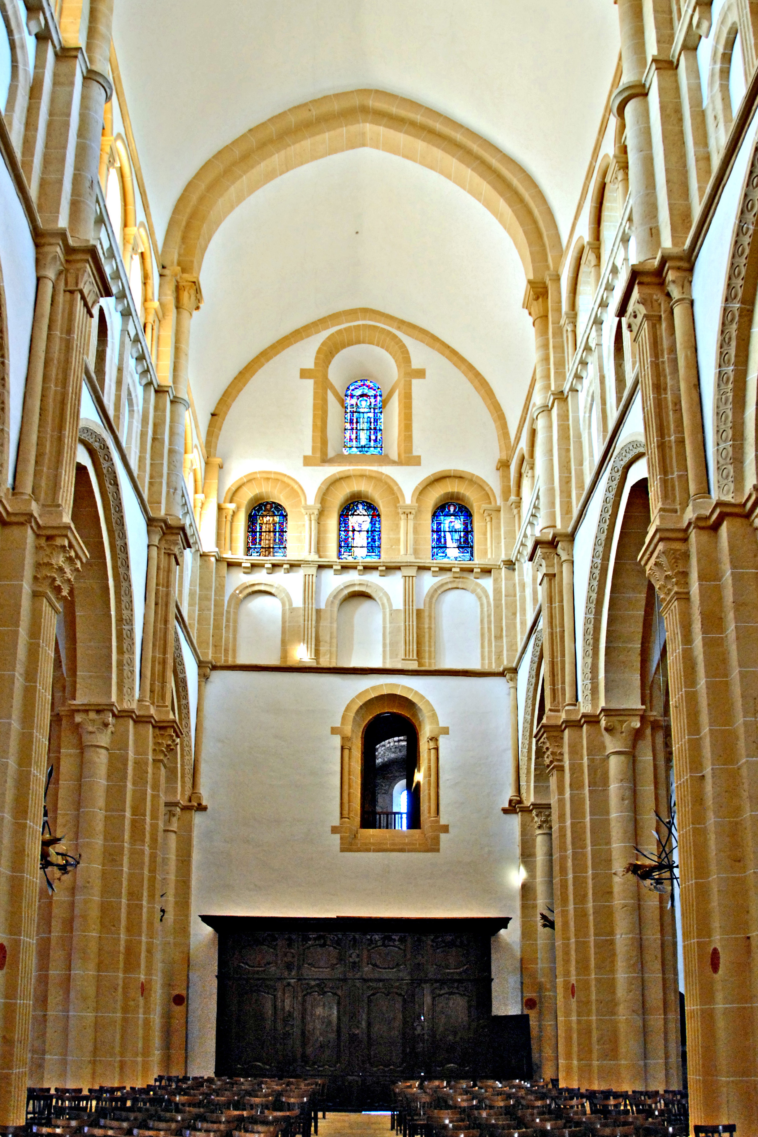 Mittelschiff, Westwand